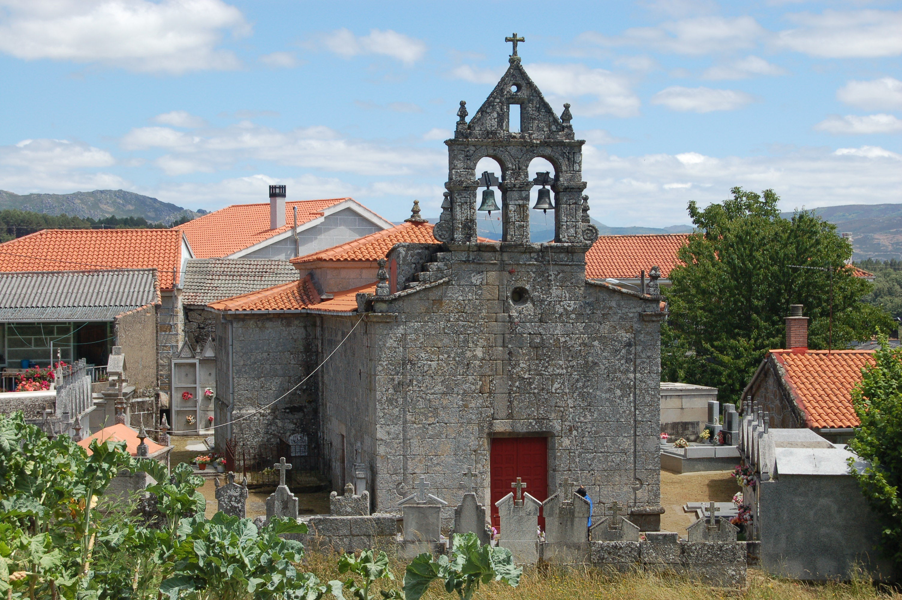 Igrexa parroquial de Santa Baia das Maus de Salas (Muíños)